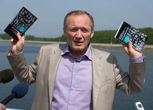 Презентация книги "Сто лиц безработицы" 04.06.2010